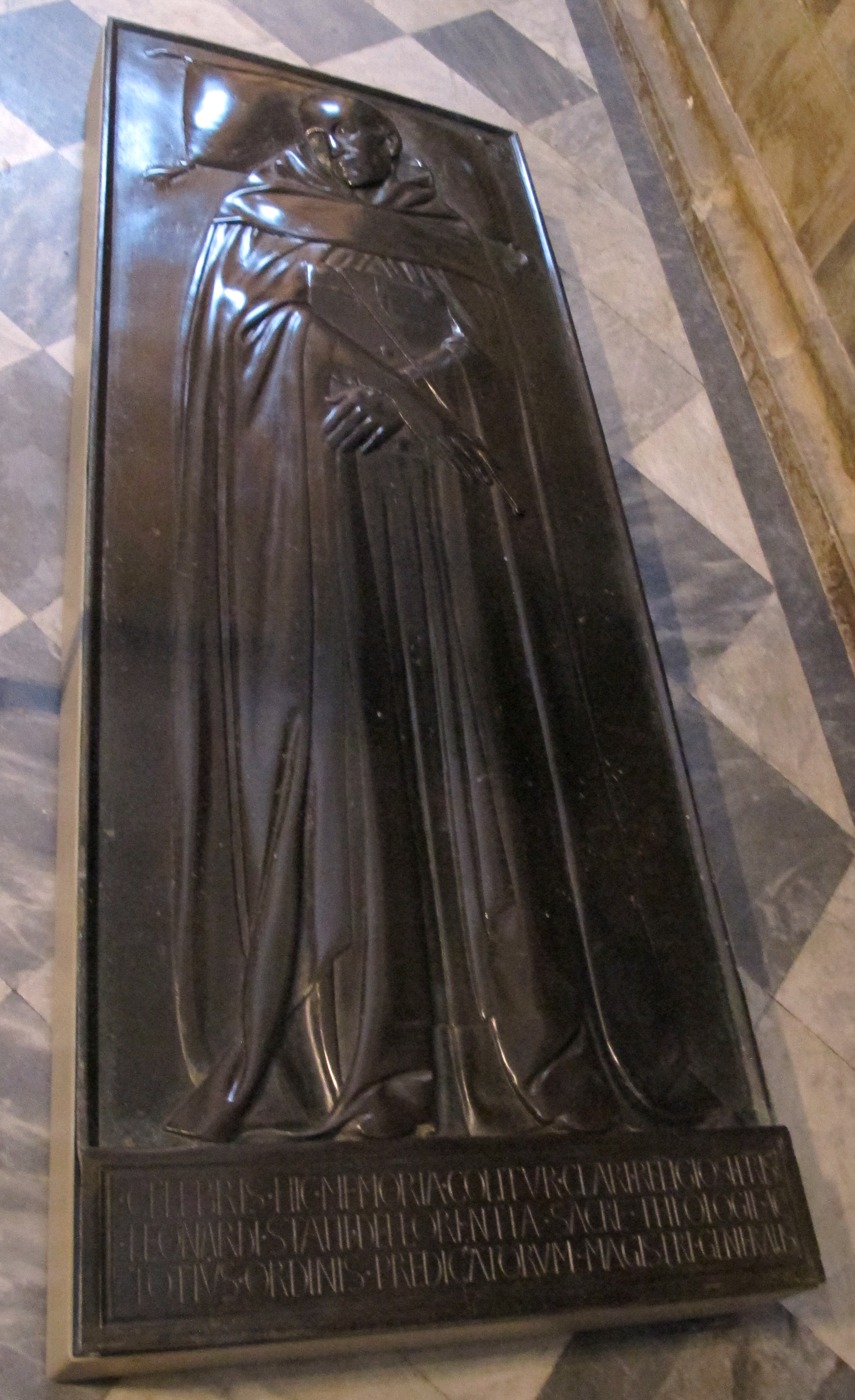 Smn, transetto dx, lorenzo ghiberti, lastra di fra leonardo dati, 1425-27